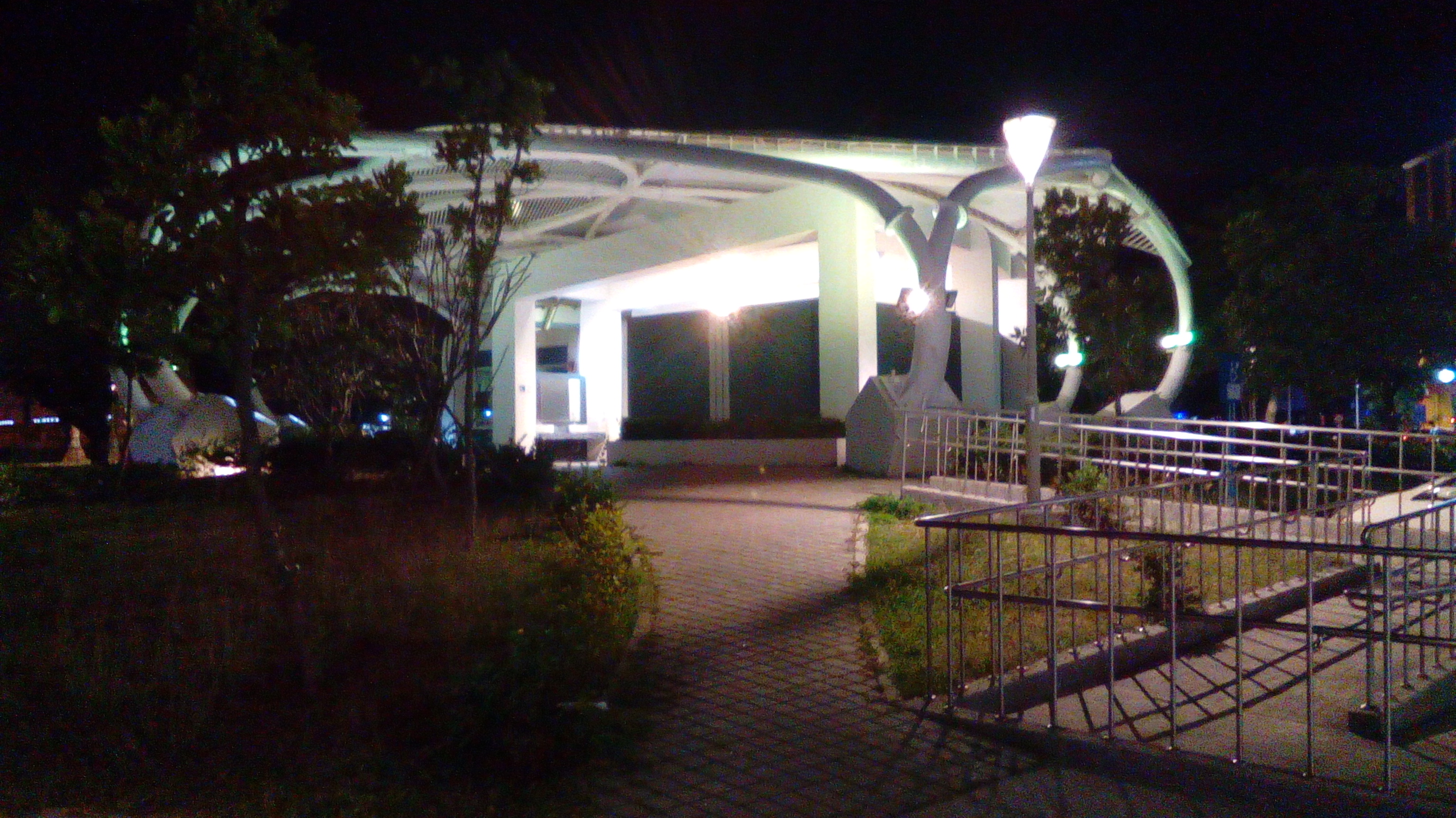 同上